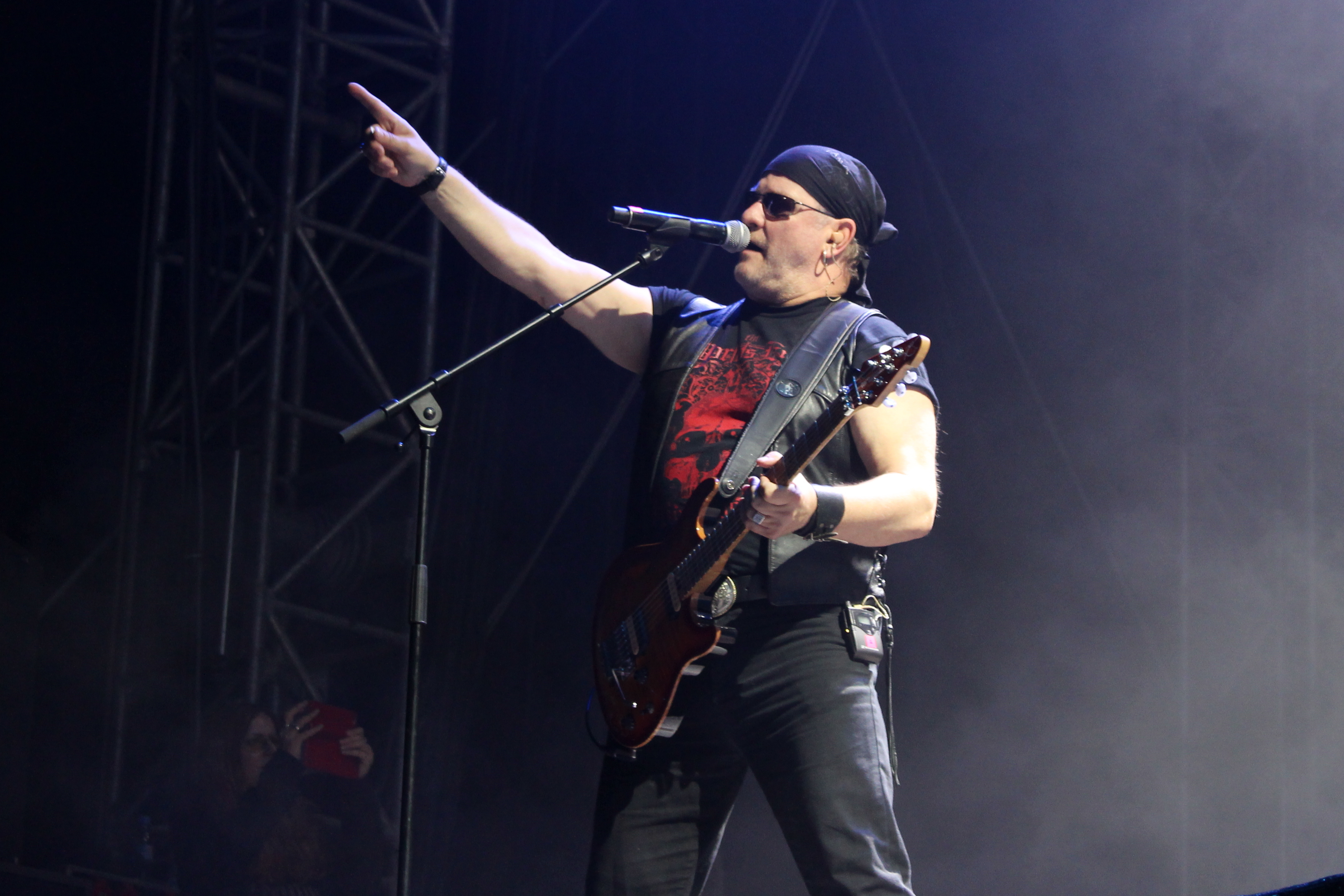 Festivalsommer This photo was created with the support of donations to Wikimedia Deutschland in the context of the CPB project "Festival Summer". Personality rights warningAlthough this work is freely licensed or in the public domain, the person(s) shown may have rights that legally restrict certain re-uses unless those depicted consent to such uses. In these cases, a model release or other evidence of consent could protect you from infringement claims.